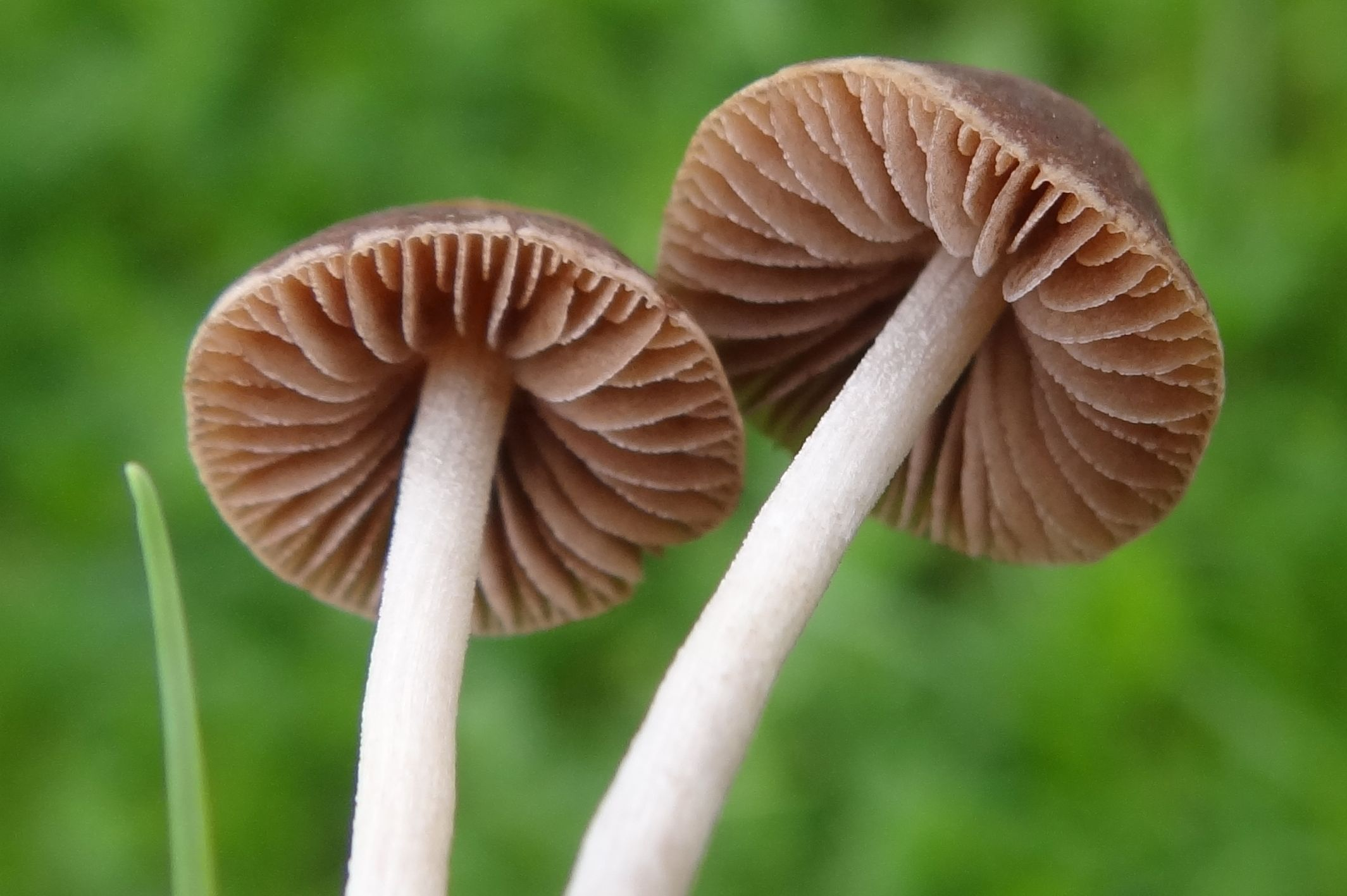 Panaeolina foenisecii (location: Poland, Trzciana, woj. małopolskie)